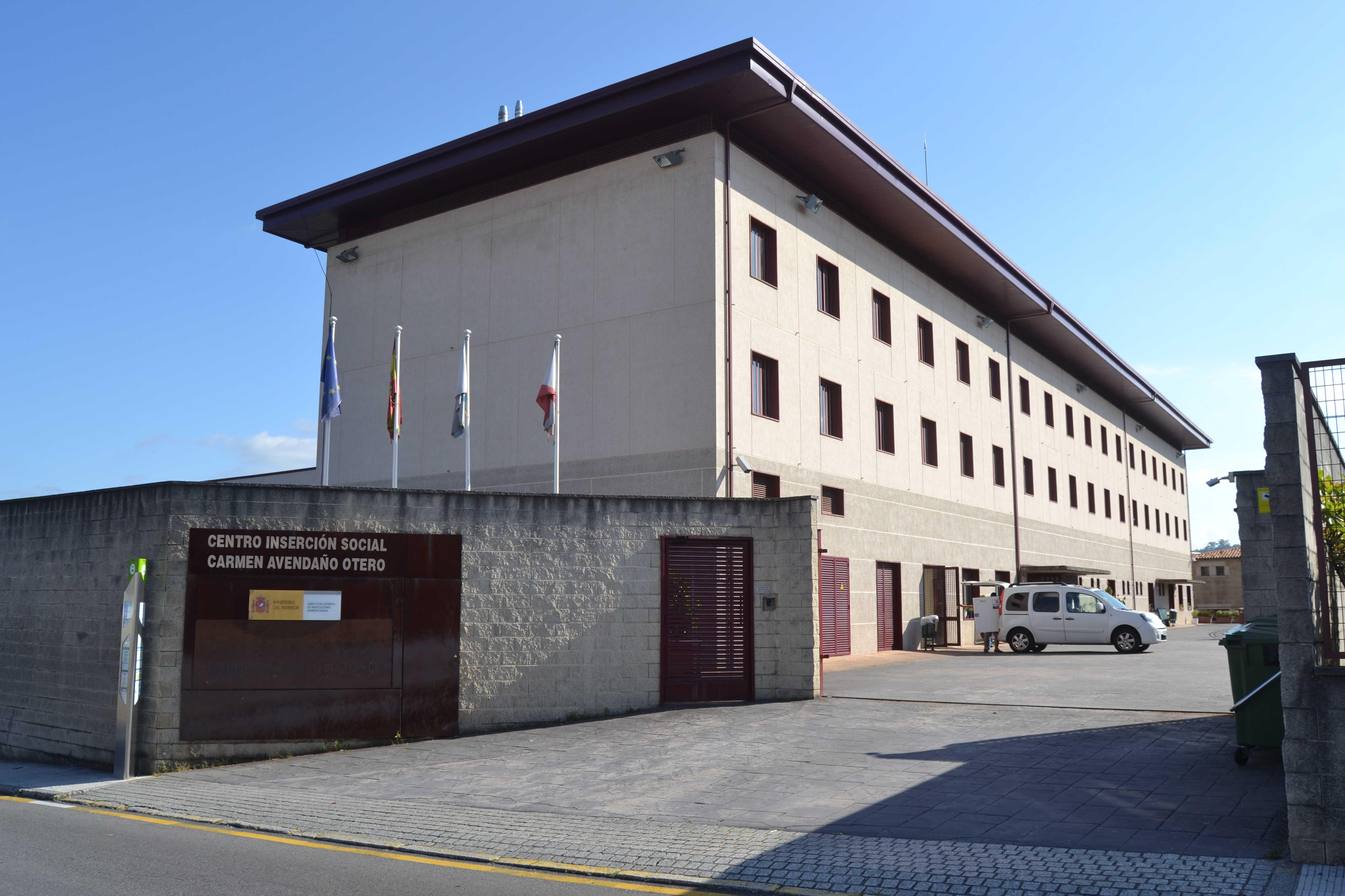 Centro de Inserción Social Carmen Avendaño Otero en Vigo (Pontevedra)